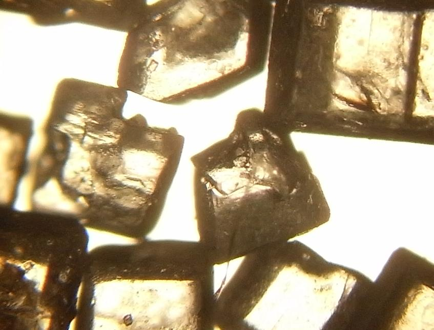 Imagen de Azucar tomada con un microscopio optico.